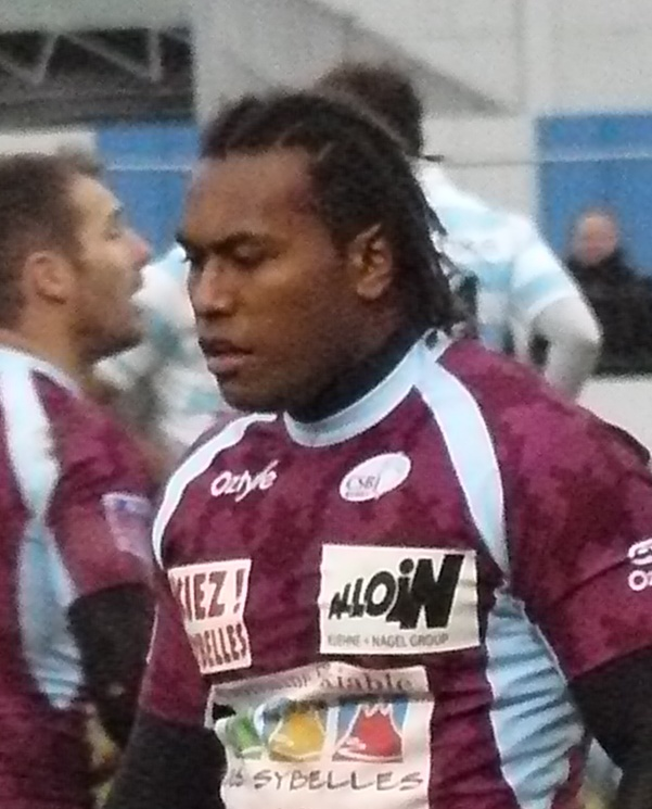 Albert VuliVuli, 3/4 aile au club CS Bourgoin-Jaillieu lors du match de Top 14 contre le Racing Métro 92, 3 janvier 20010 à Colombes.